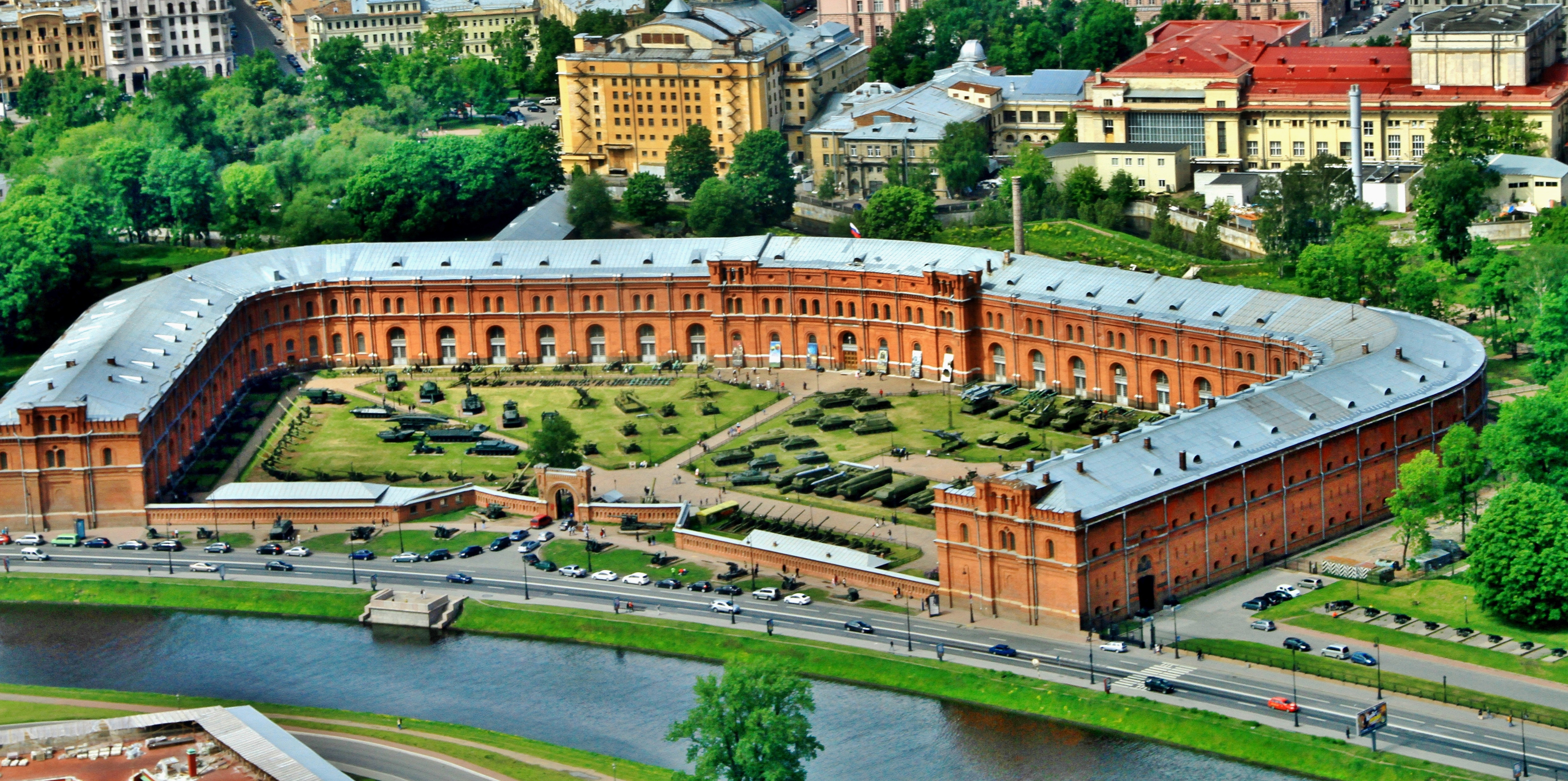 Кронверк Петропавловской крепости (Санкт-Петербург и Лен.область, Санкт-Петербург, Александровский парк)